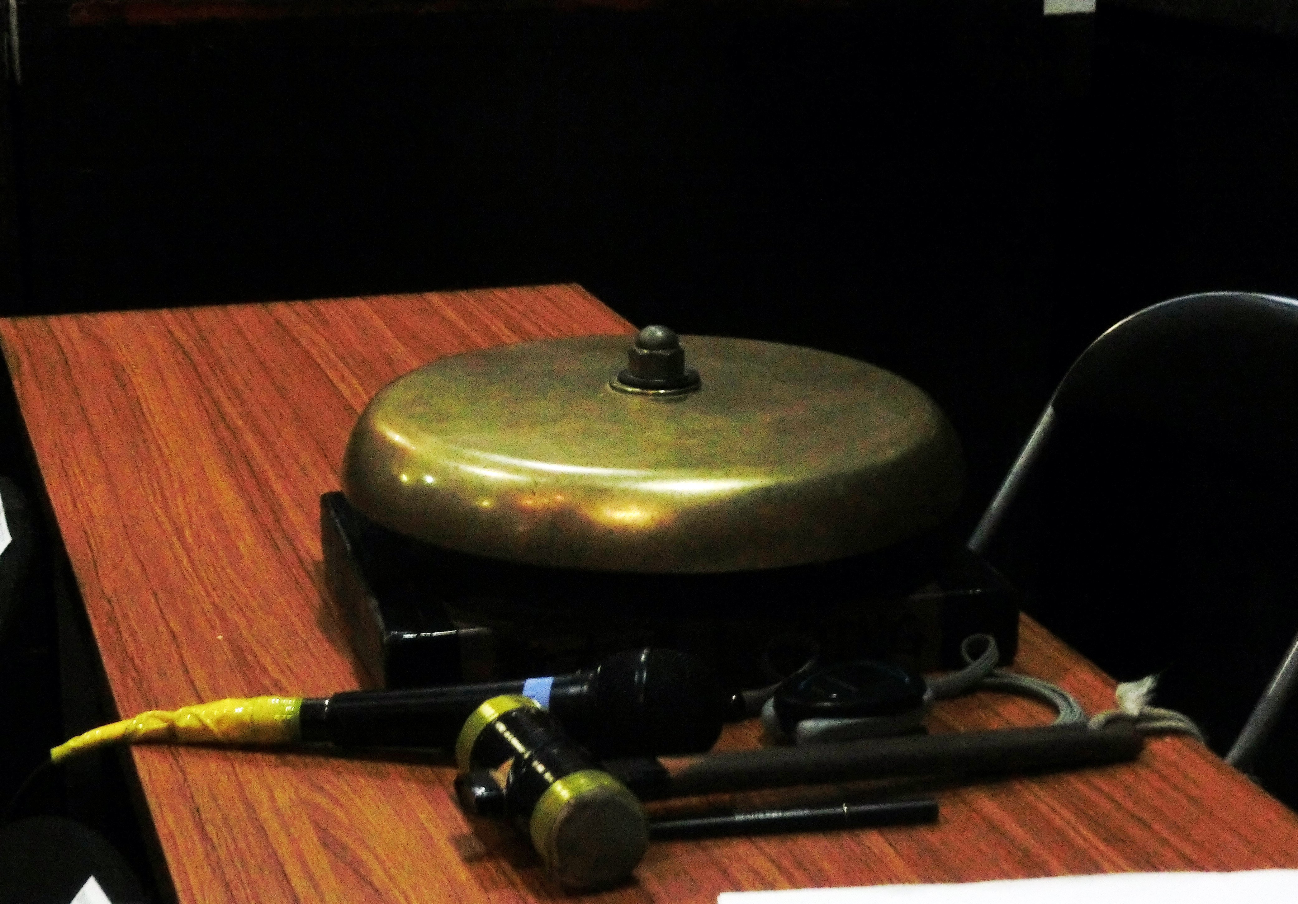 新木場1stリング 近藤 有己